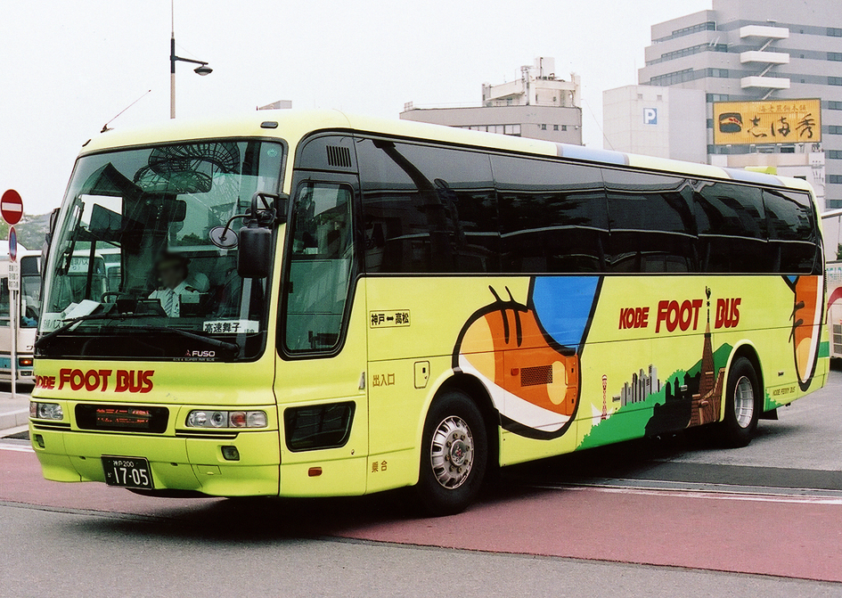 神戸フェリーバス 神戸フットバス 三菱ふそう・エアロバス KL-MS86MP